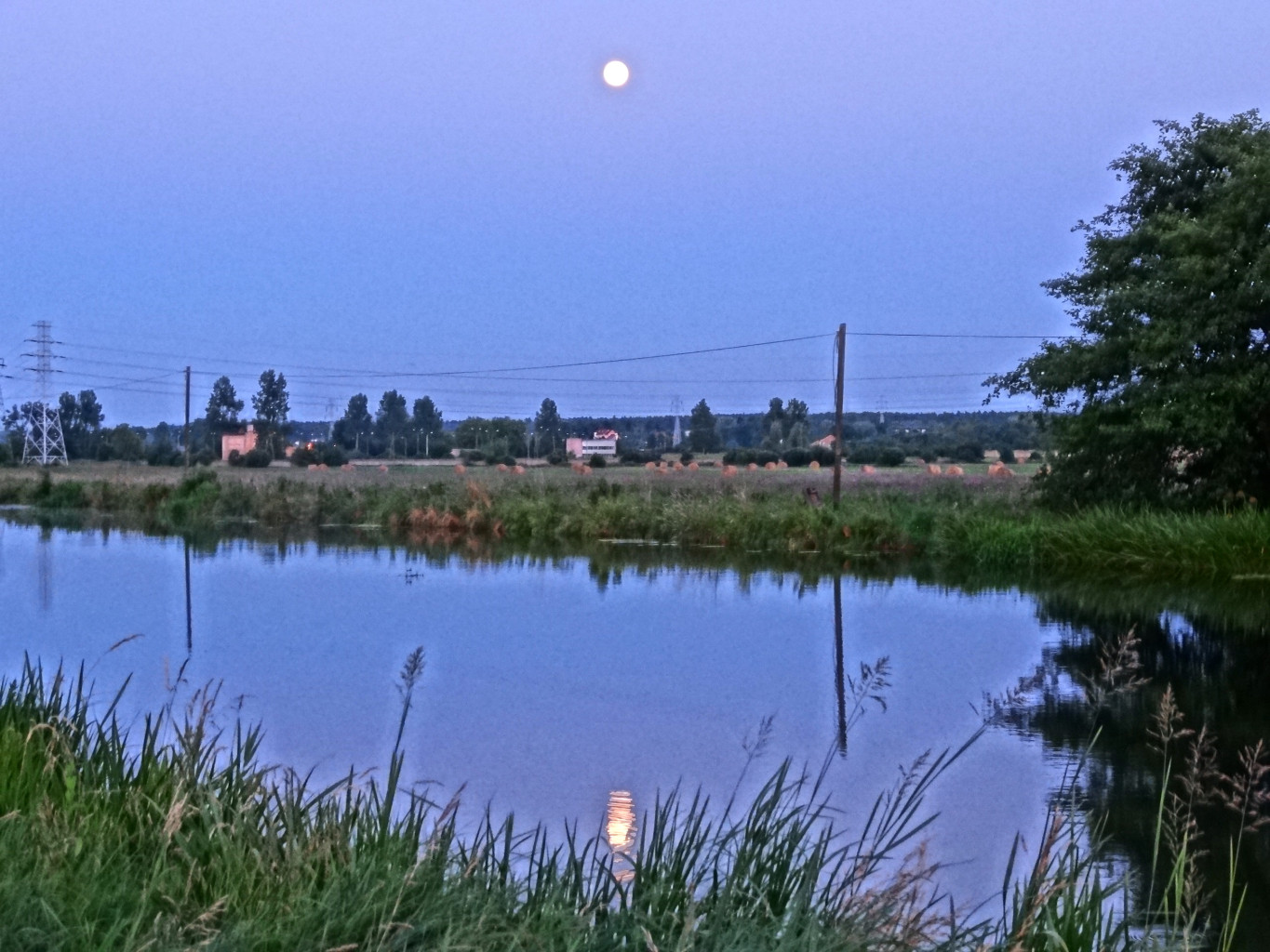 Kanał Bydgoski w zachodnich dzielnicach Bydgoszczy o zmierzchu i pełni księżyca